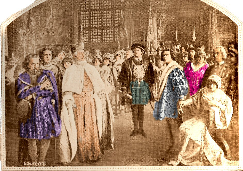 Le pont des soupirs, d'après l'œvre de Michel Zévaco